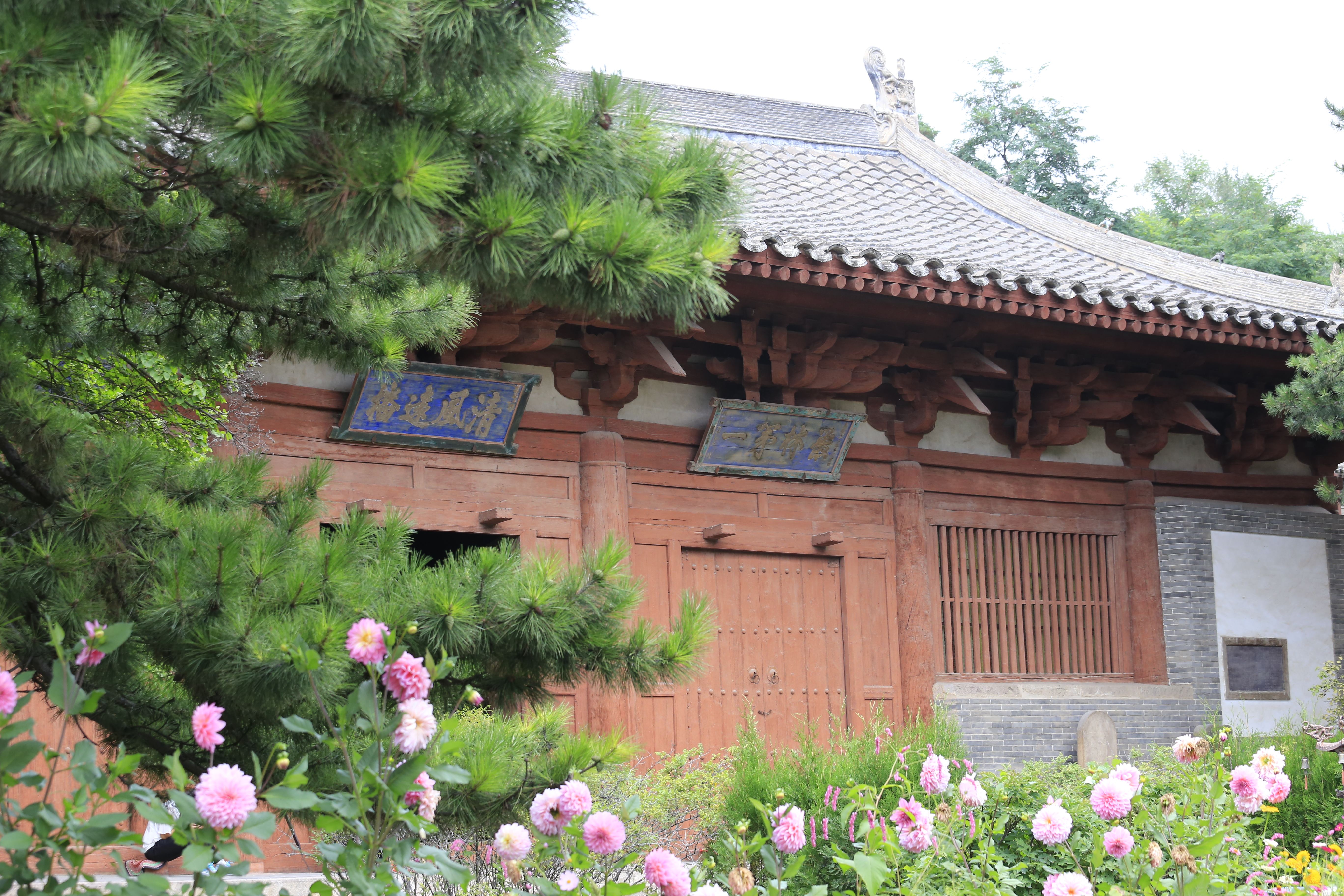 五台佛光寺—— 文殊殿